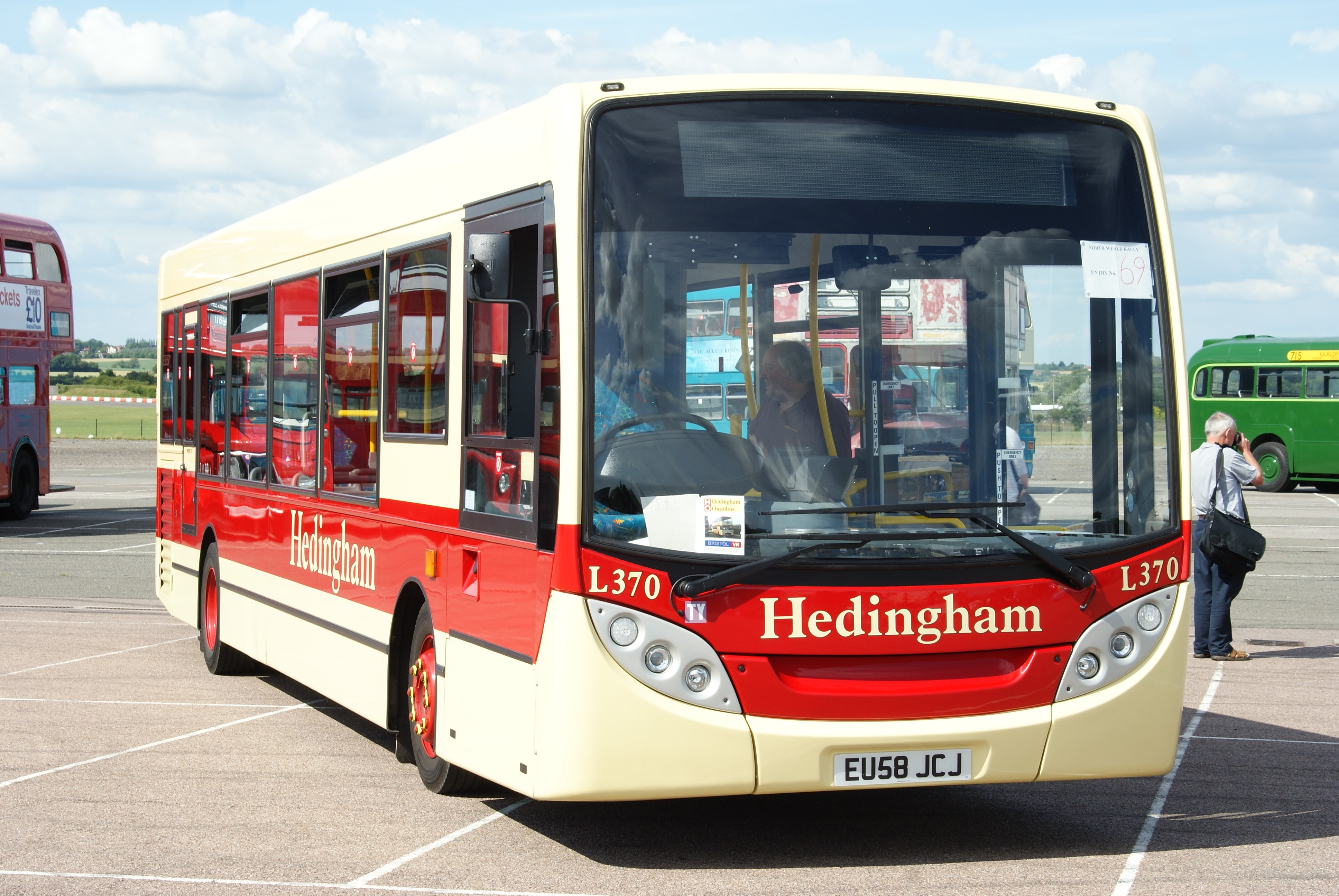 L370-EU58JCJ-6 050709 CPS